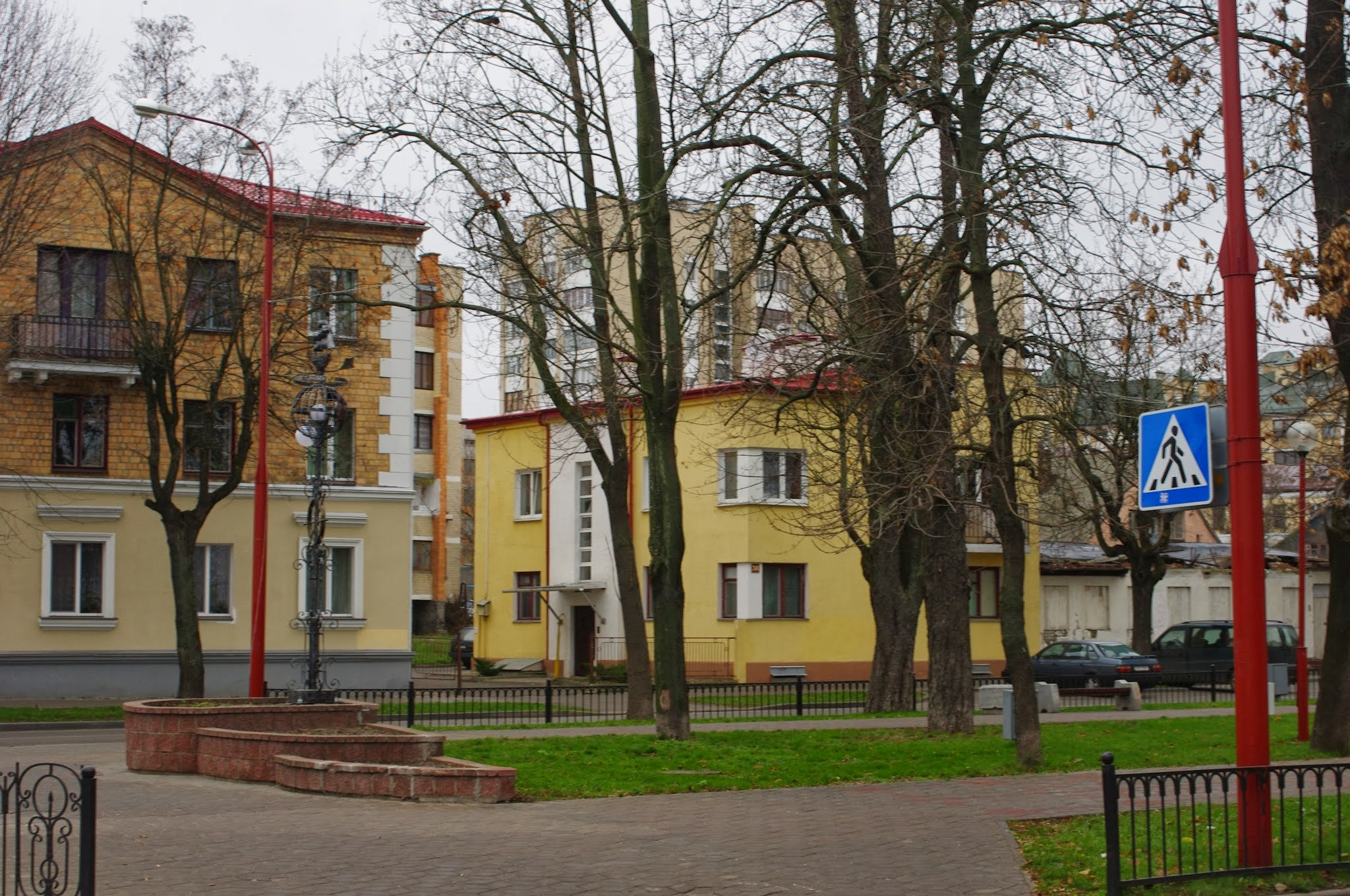 Lieninski rajon, Brest, Belarus